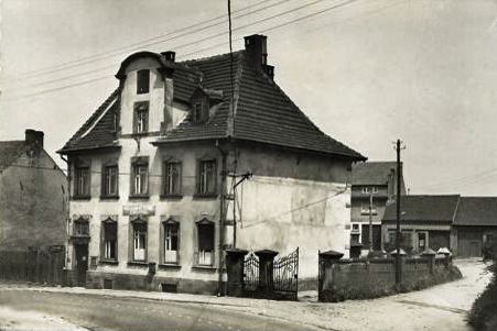 L'Hôpital (Moselle), vue de l'ancienne poste impériale en style germanique, construite avant 1914.